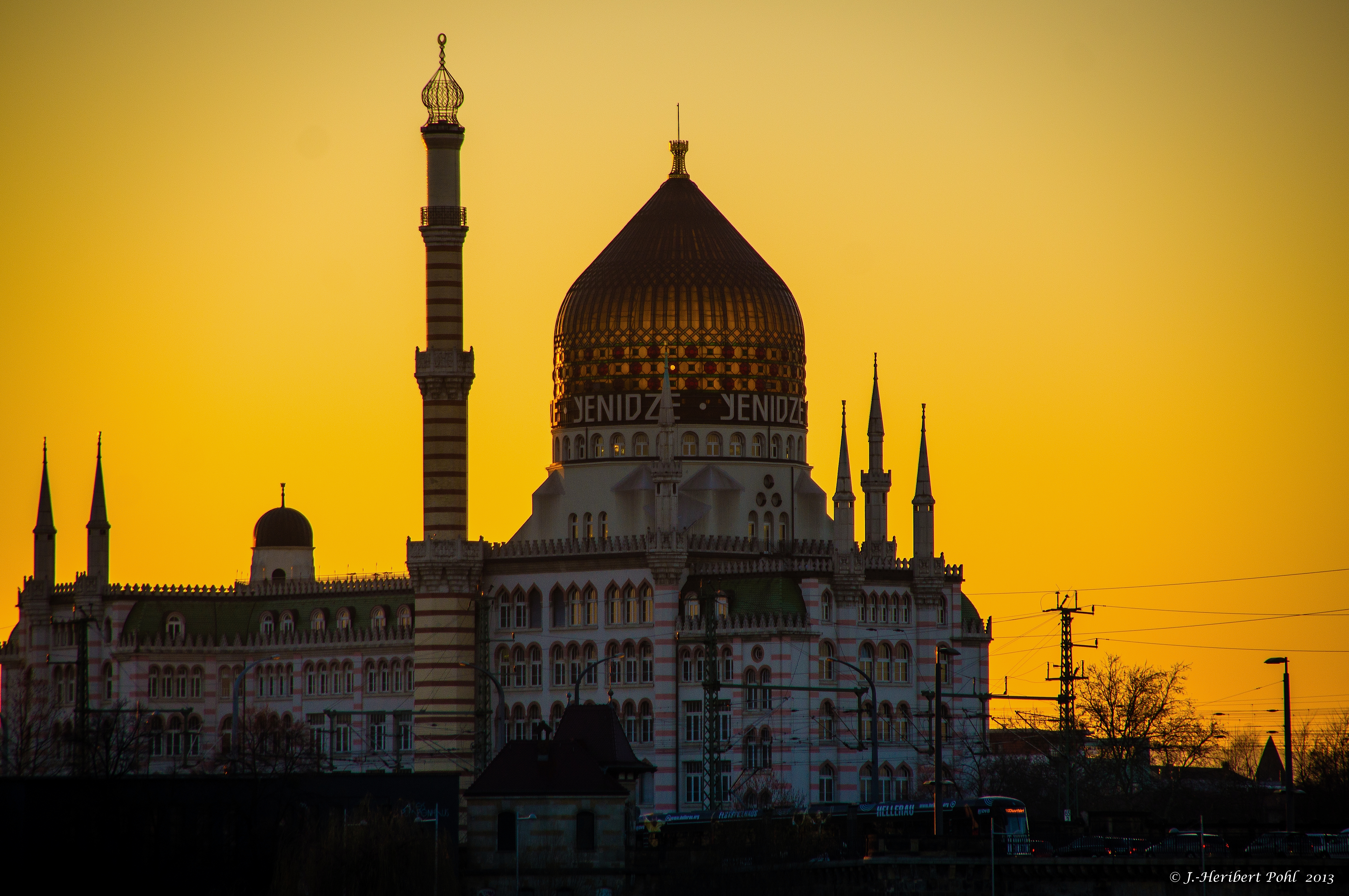 Das ehemalige Fabrikgebäude der Zigarettenfabrik Yenidze wurde zwischen 1908 und 1909 vom Unternehmer Hugo Zietz erbaut. Es steht in Dresden an der Weißeritzstraße